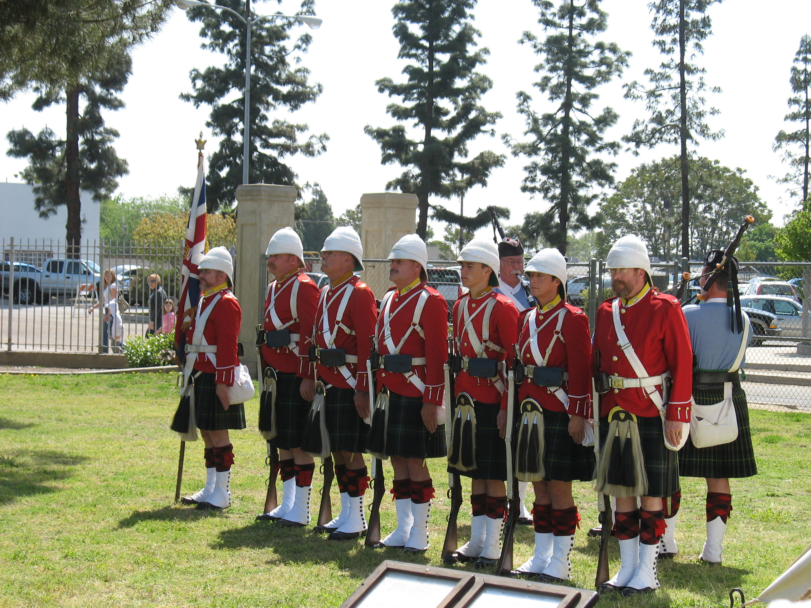 Gordon Highlanders